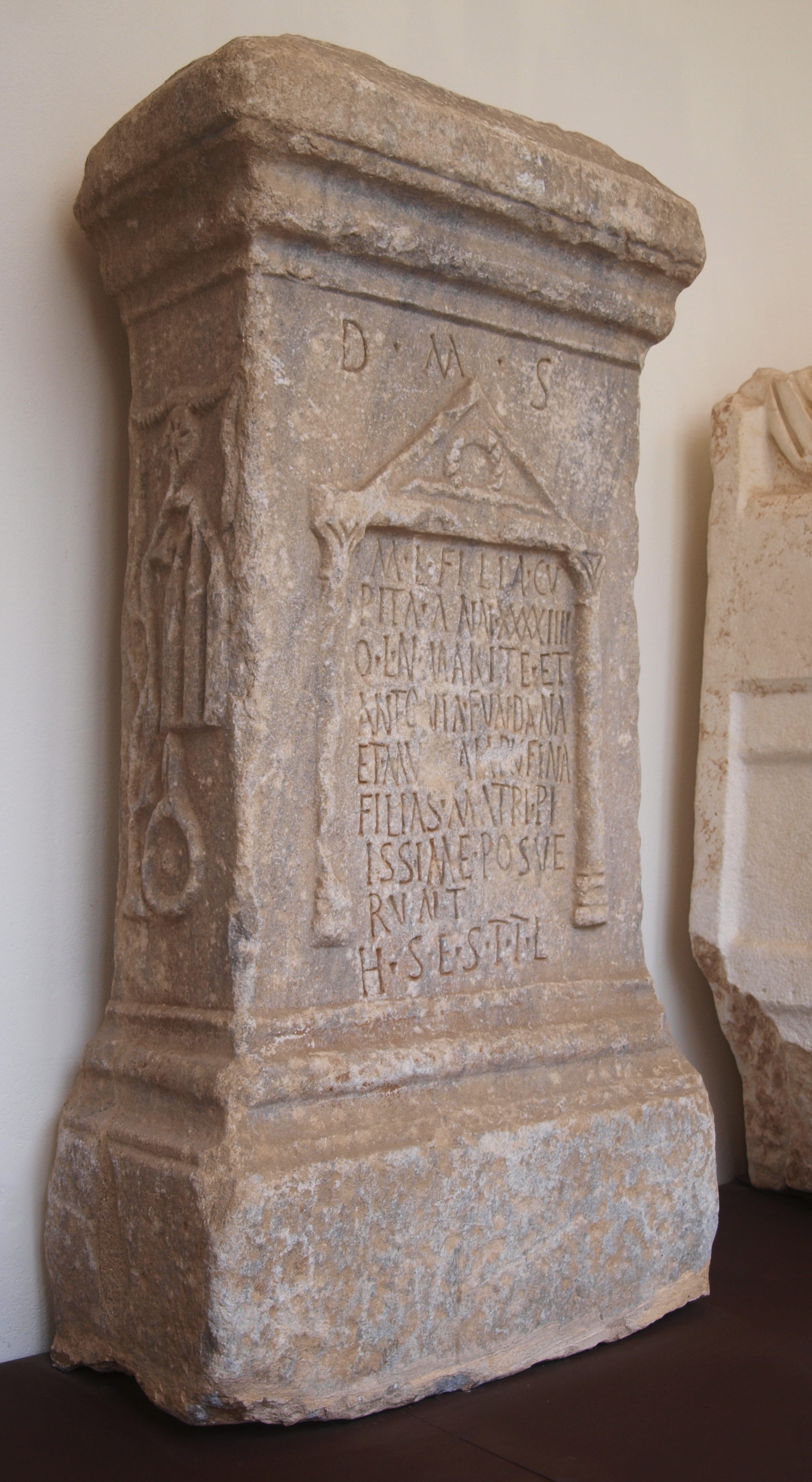 Transcrição/transcripción/transcriptionːD(is) M(anibus) s(acrum) / M(umia) L(uci) filia Cu/pita ann(orum) XXXXIIII / Q(uintus) L N marit(a)e et / Antonia Fundana / et Mumia Rufina / filias (sic) matri pi/issim(a)e posue/runt / h(ic) s(ita) e(st) s(it) t(ibi) t(erra) l(evis). (CIL II 38)